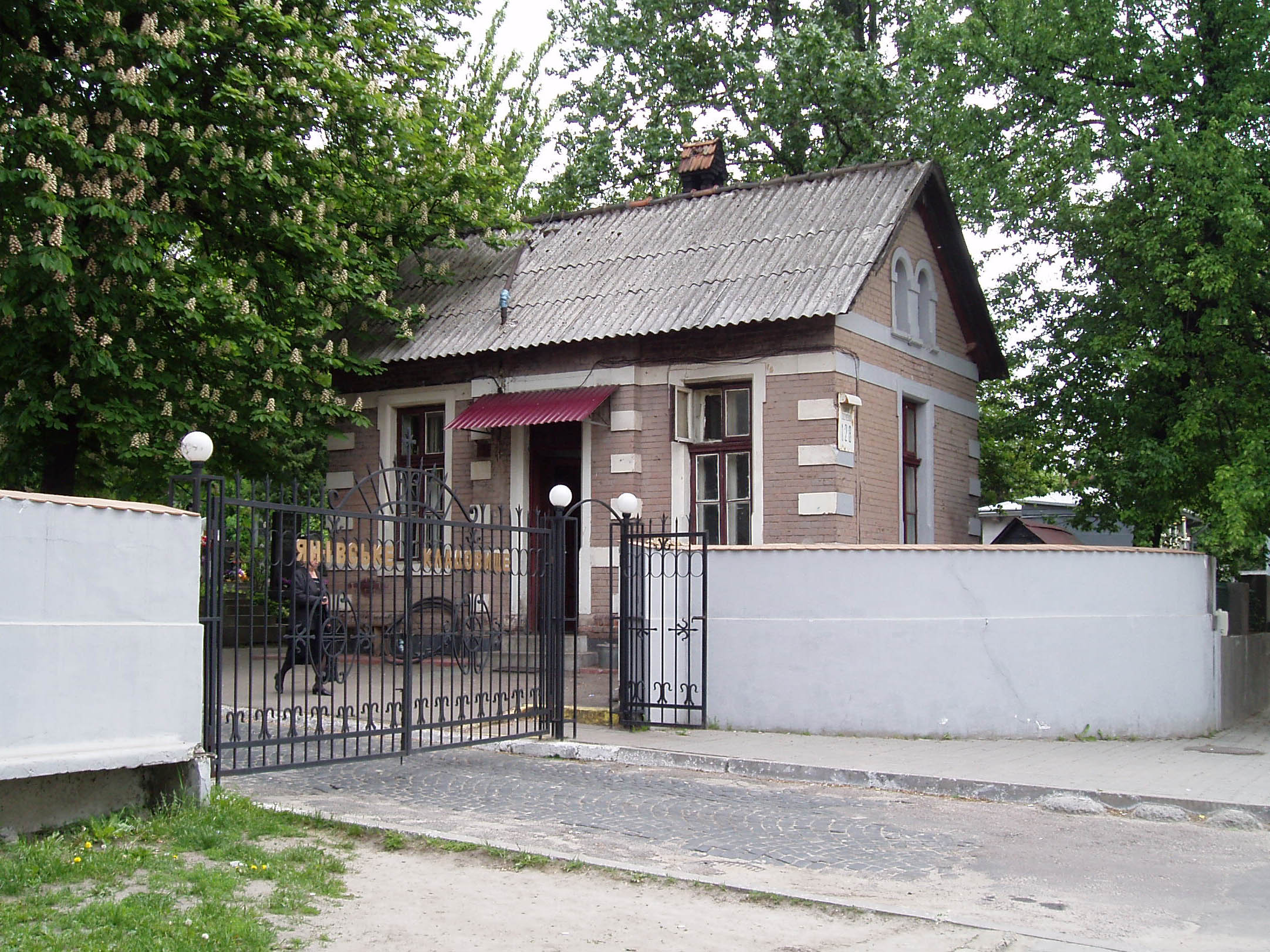 Вхід до Янівського цвинтаря у Львові.